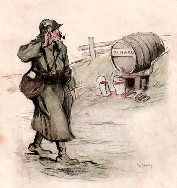 Le salut au Père Pinard